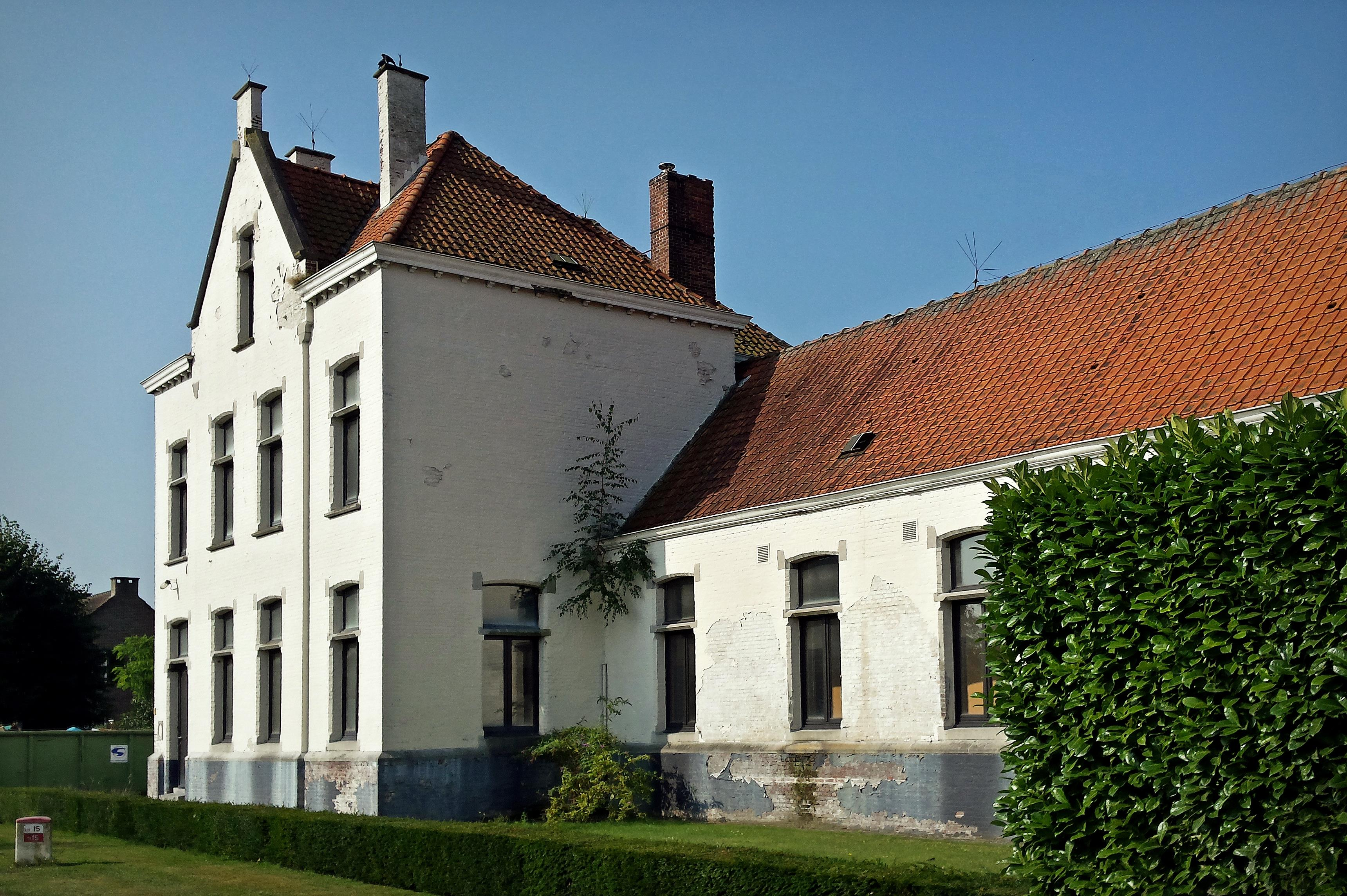 Voormalig badhuis opgericht te Geel, Dr.-Van de Perrestraat 262 in 1901-1902, als wijkgebouw van het Openbaar Psychiatrisch Ziekenhuis, op het kadaster opgetekend in 1902, thans ingericht als opvangtehuis met diverse arbeidstherapieën.